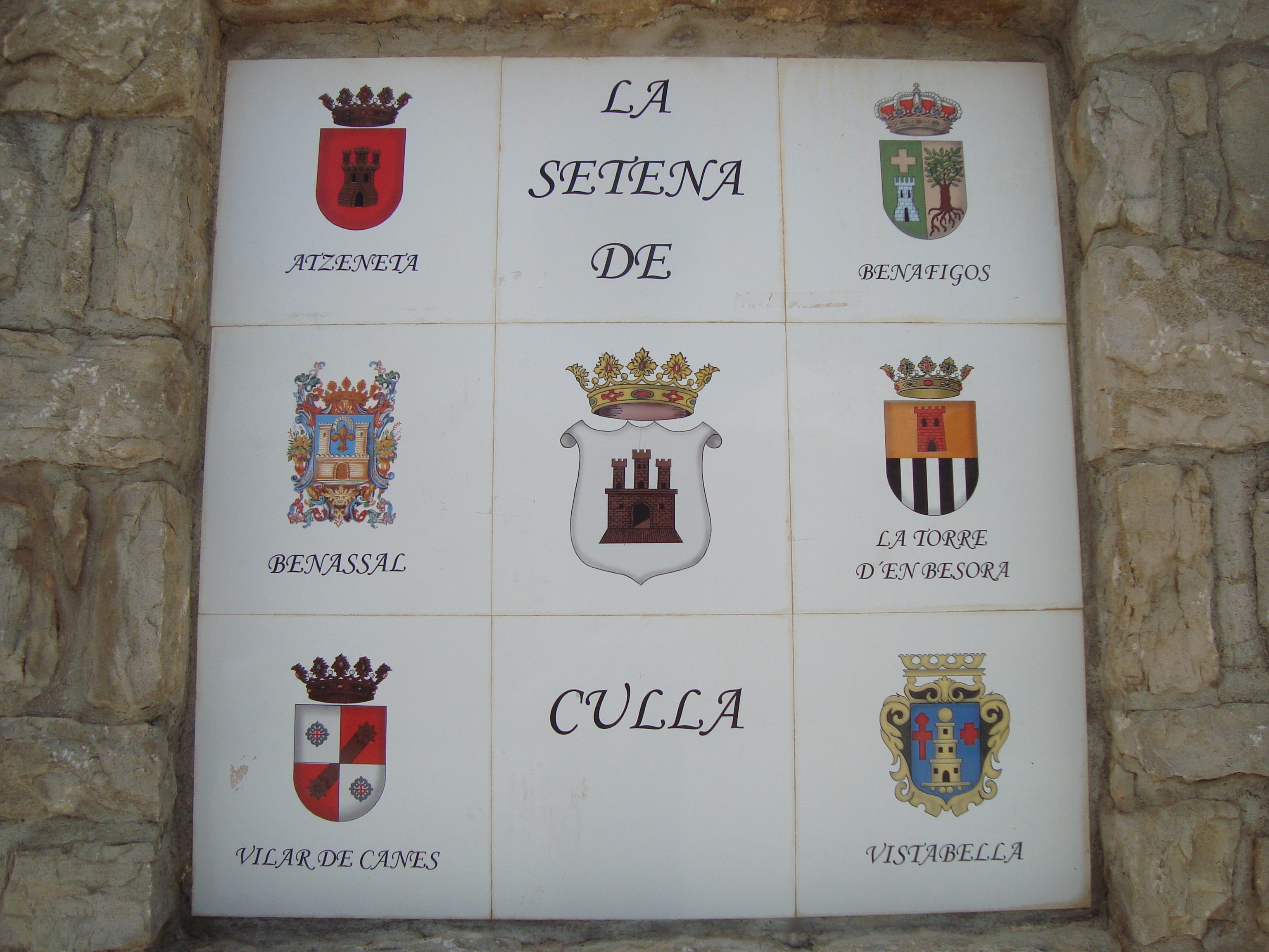 Heráldica de los siete pueblos que formavan parte de la Setena de Culla a lo largo de unos 500 años